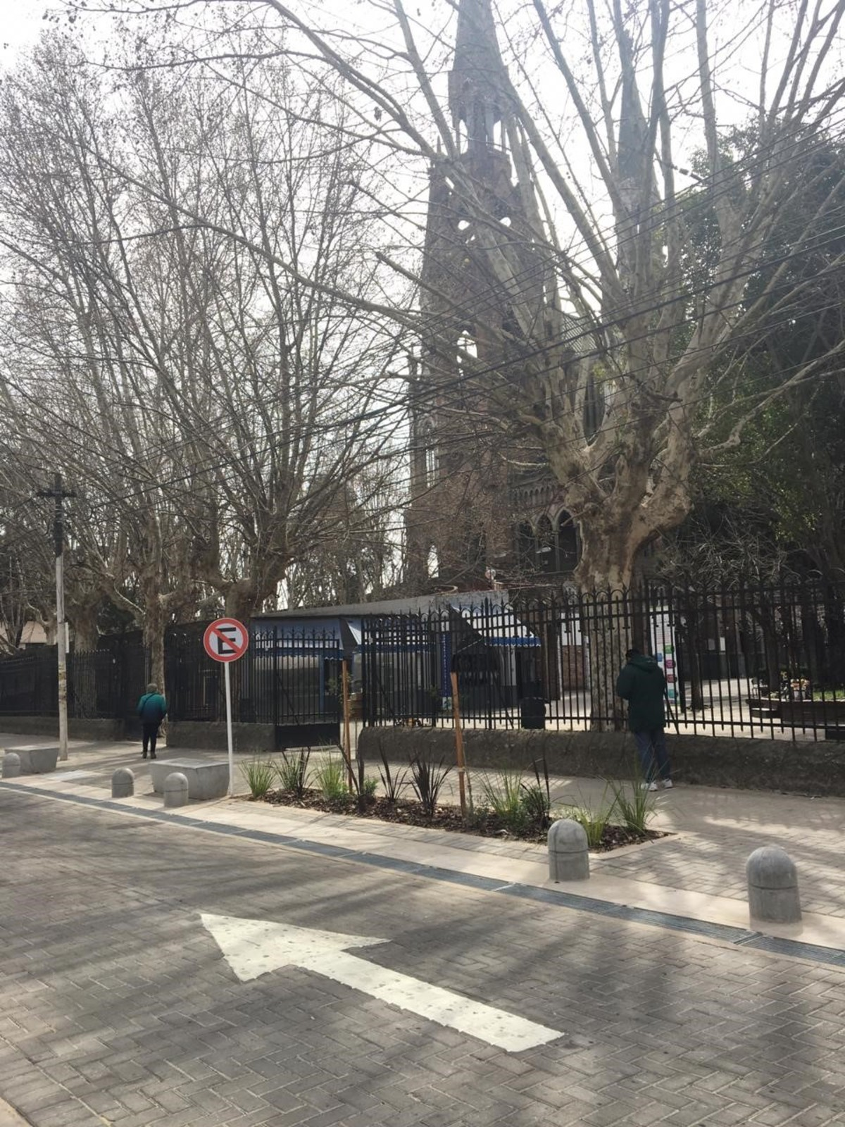 Foto de la Iglesia de Lourdes, en una de las calles principales de Santos Lugares, Avenida La Plata